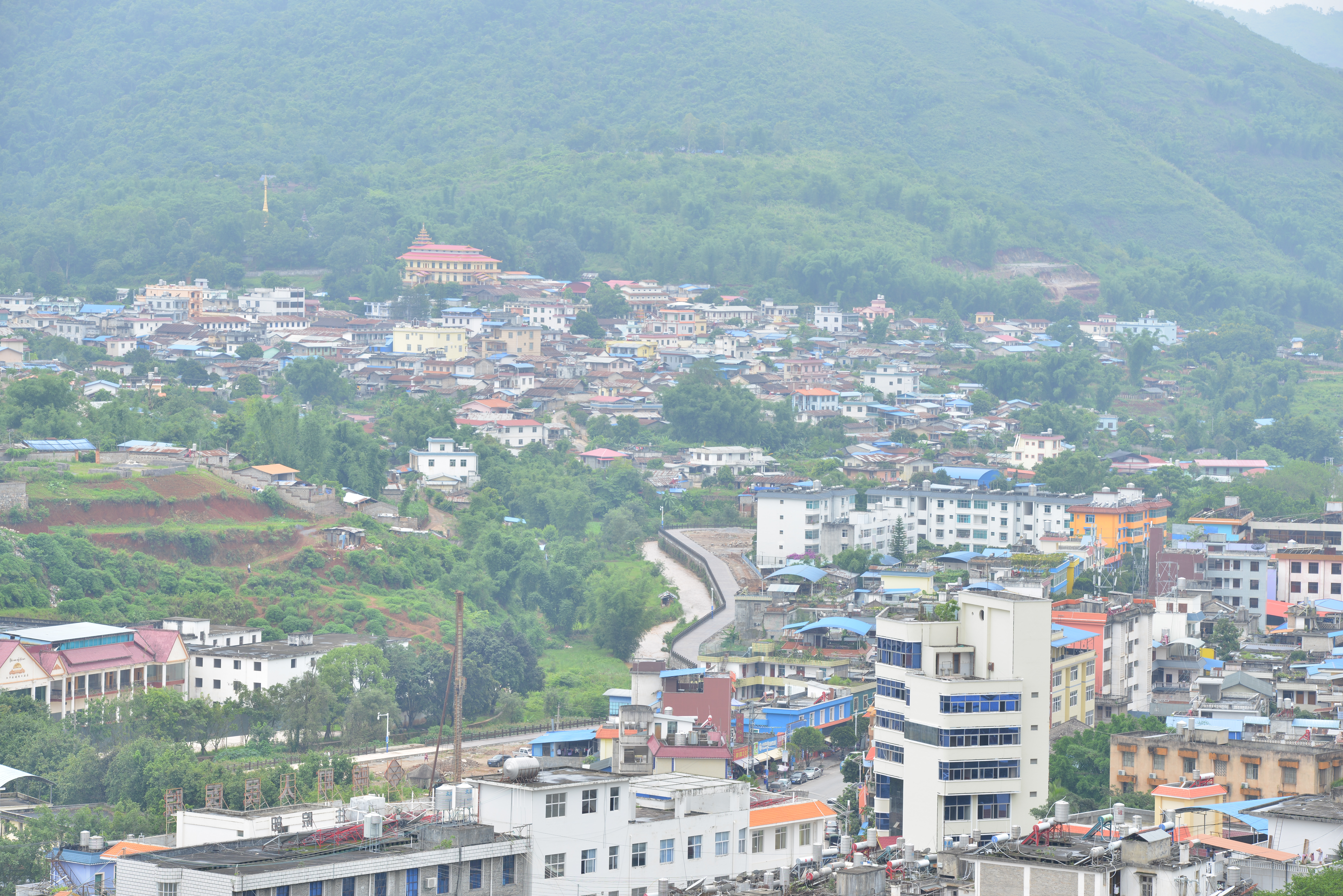 中文（中国大陆）: 畹町-棒赛天际线